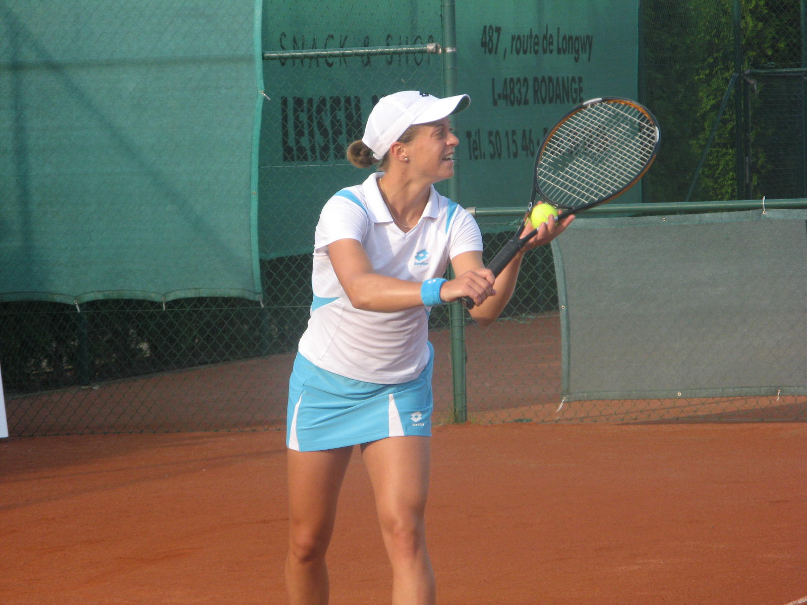 Martina Müller beim mit 75.000$ dotierten ITF-Turnier in Pétange/Luxemburg